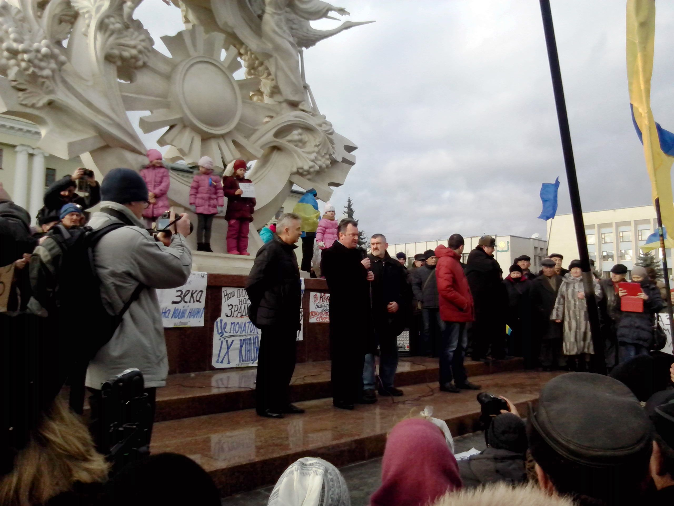 Євромайдан у Хмельницькому 1 грудня 2013 року. Майдан Незалежності.